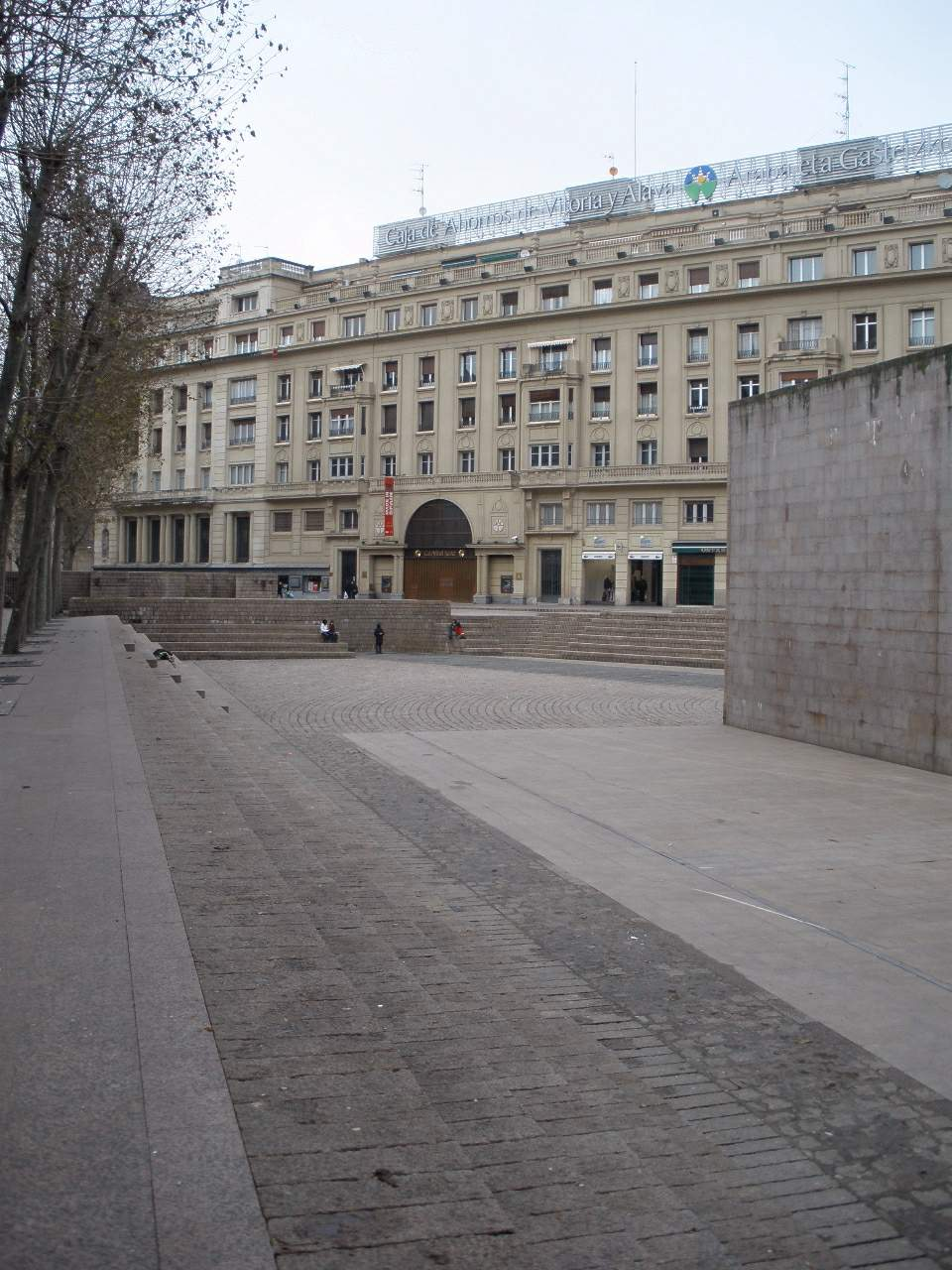 Plaza de los Fueros, en Vitoria-Gasteiz